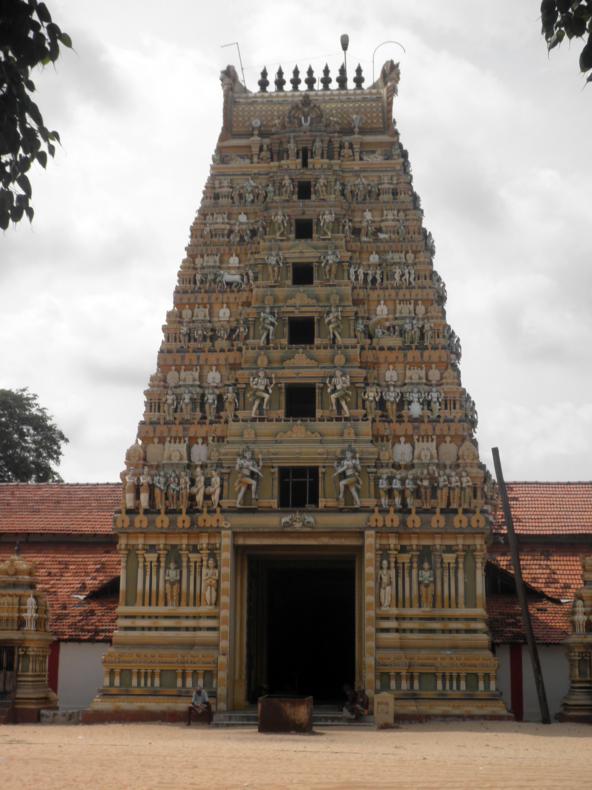 Vishnu temple, Vallipuram, Sri Lanka